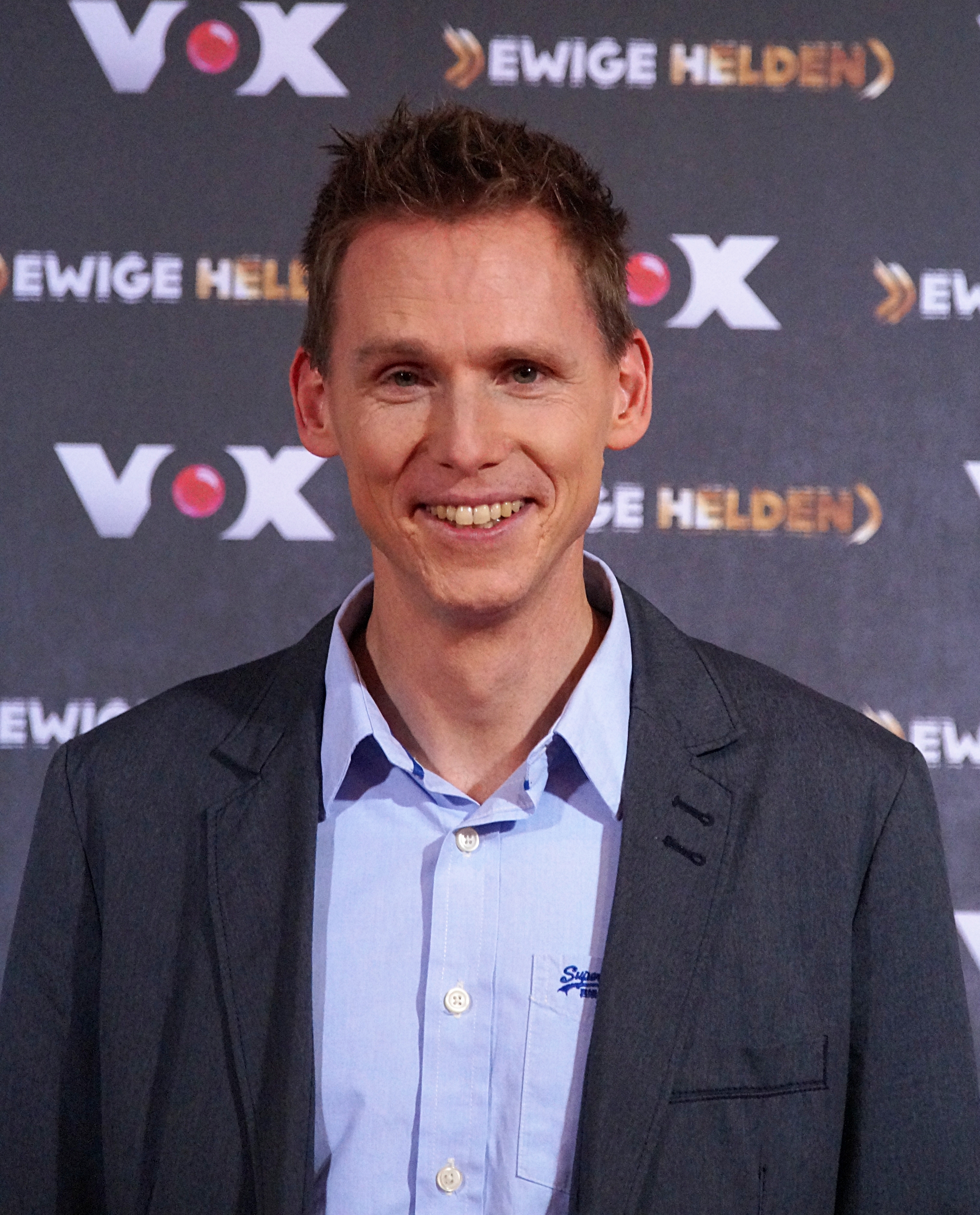 Frank Busemann beim VOX "Ewige Helden" Pressetermin, im Dezember 2015.